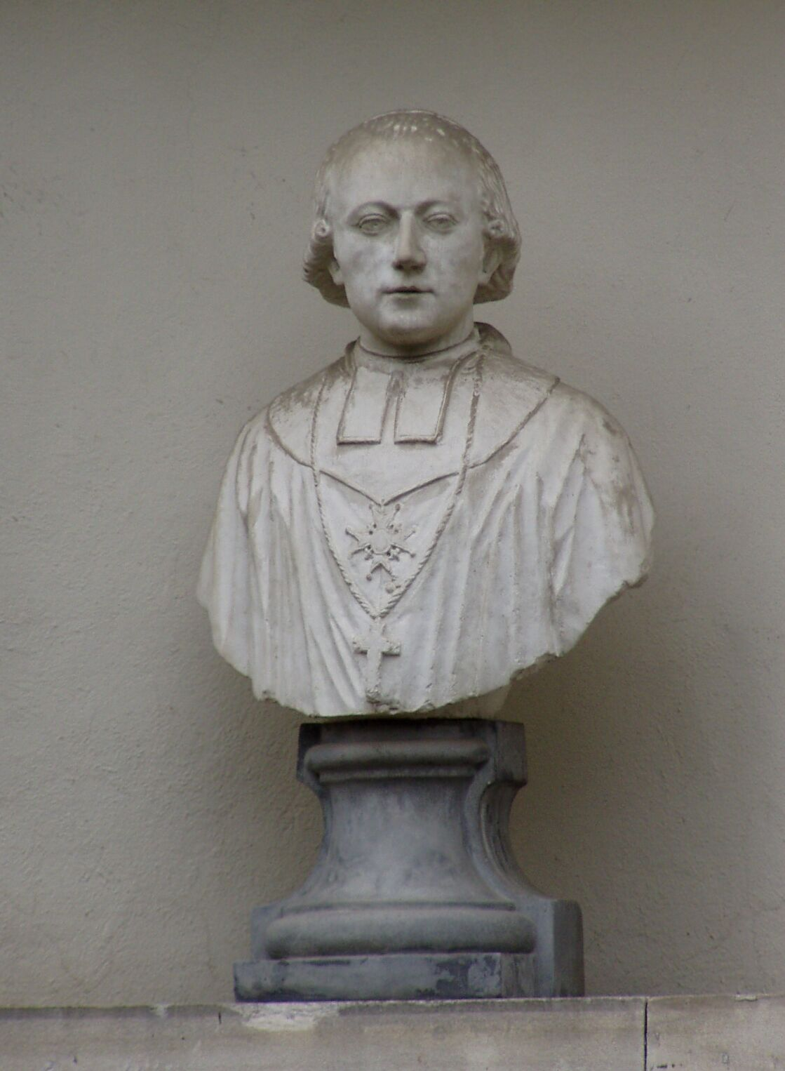 Dom zu Klagenfurt / Klagenfurt Cathedral: Nordeingang, Büste Fürstbischof Salm